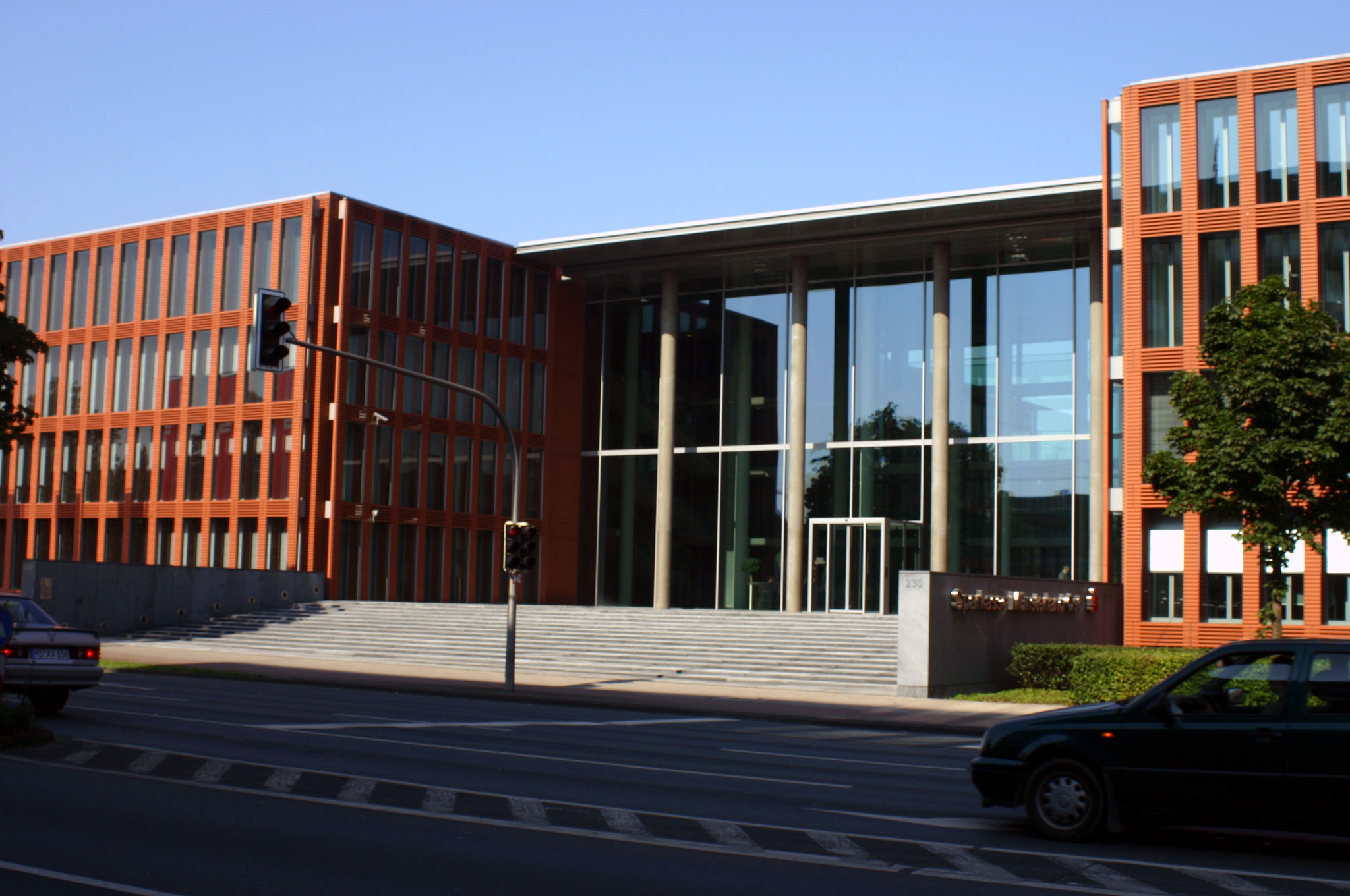 Münster, Sparkassenzentrale, Weseler Str., Sparkasse Münsterland Ost, Architekt/Fachplaner: Prof. Dieter Georg Baumewerd, Münster